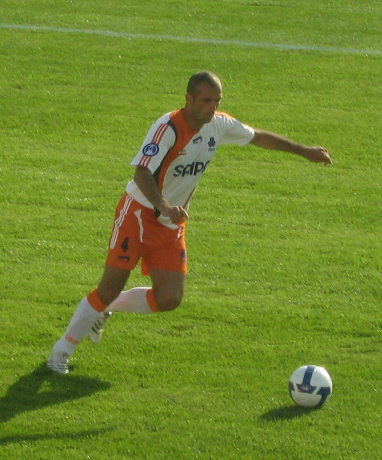 Seyed Jalal Hosseini Khoshkebejari